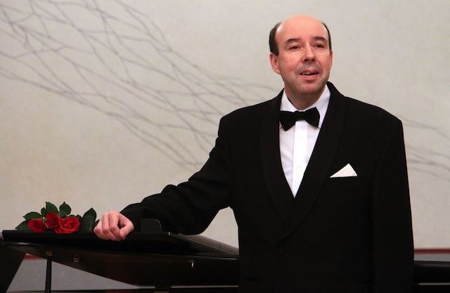 Toomas Kuter kontserdil (2010)